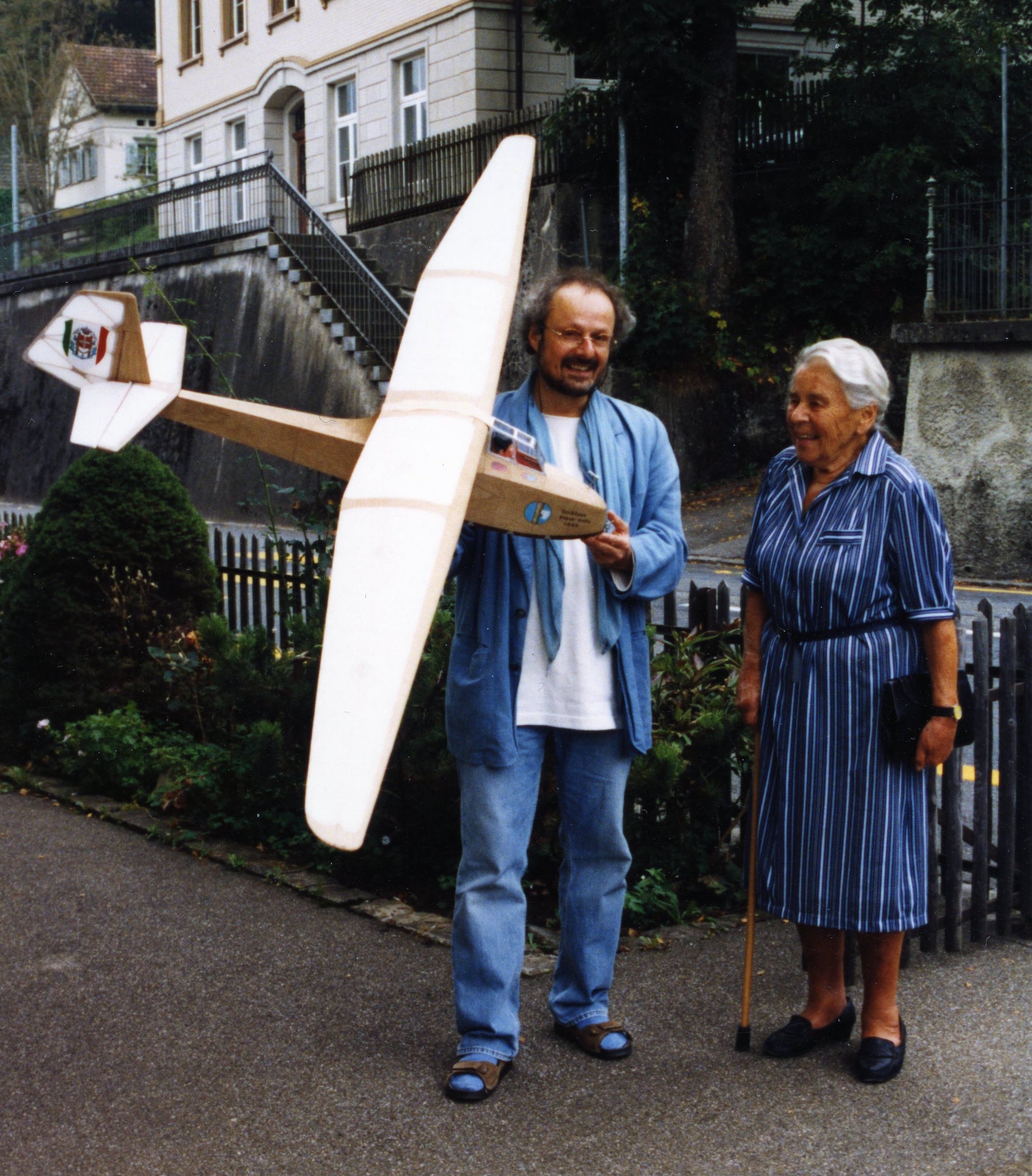 Fréderic Fischer, Gründer der "Modellbaugruppe Albatros", Initiant der "IG Albatros" und Betreiber des "Segelflugmuseums Trogen" trifft Elisabeth Pletscher, Zeitzeugin des "Ur-Albatros" von 1928